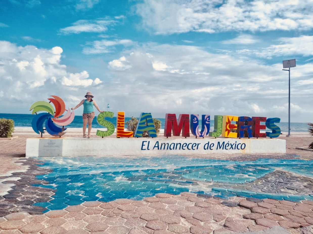 Isla Mujeres es una pequeña isla caribeña, es un lugar mágico donde poder contemplar restos arqueológicos, cerca del mar.